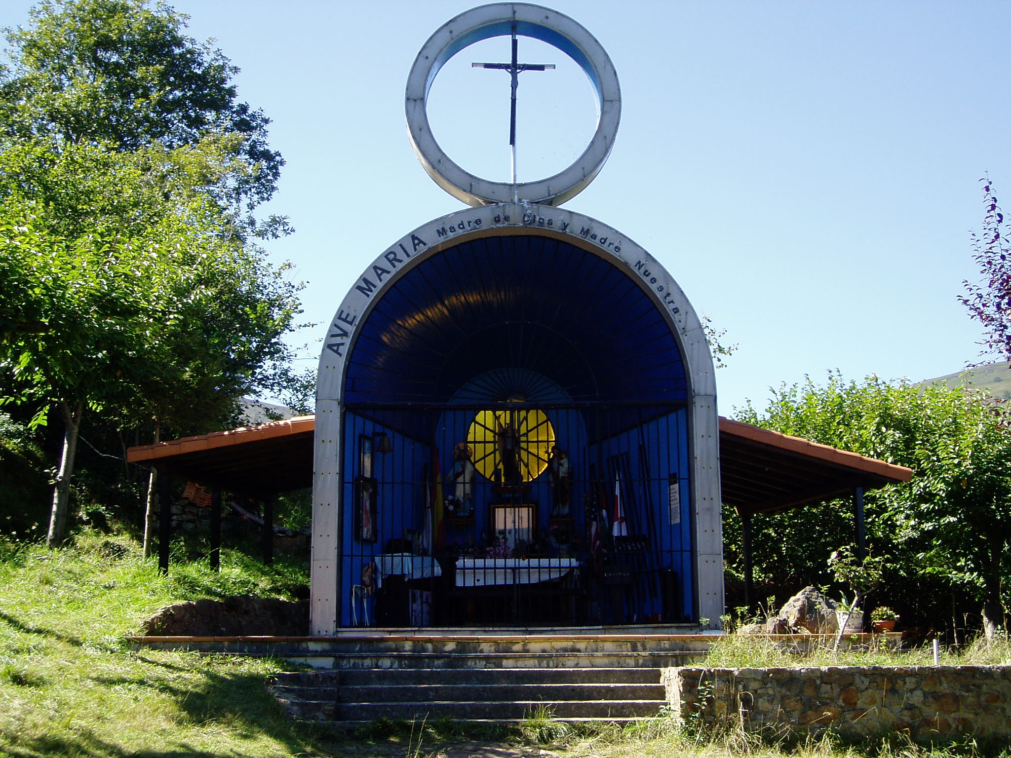 Capilla del Arcángel San Miguel, situada en San Sebastian de Garabandal